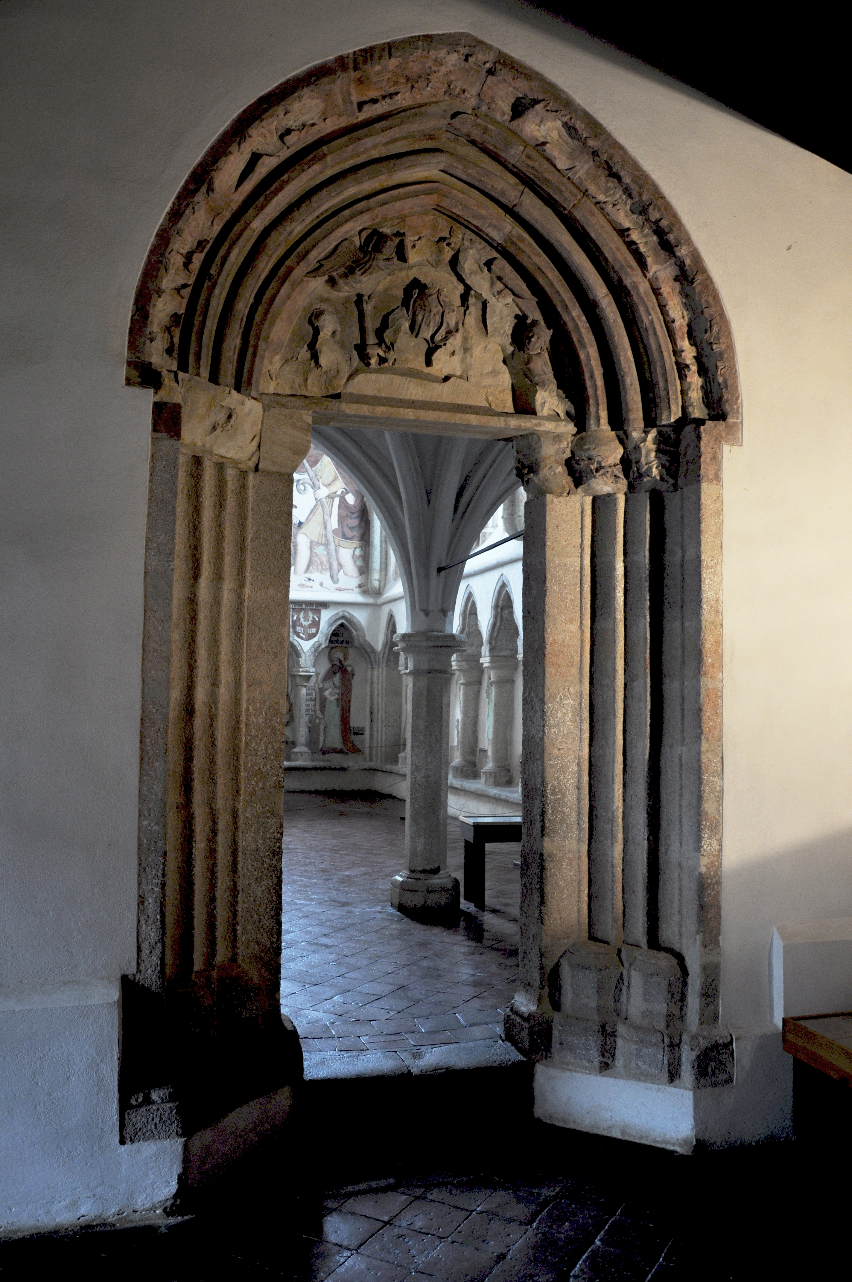 Zvíkov - tympanon vstupního portálu do hradní kaple